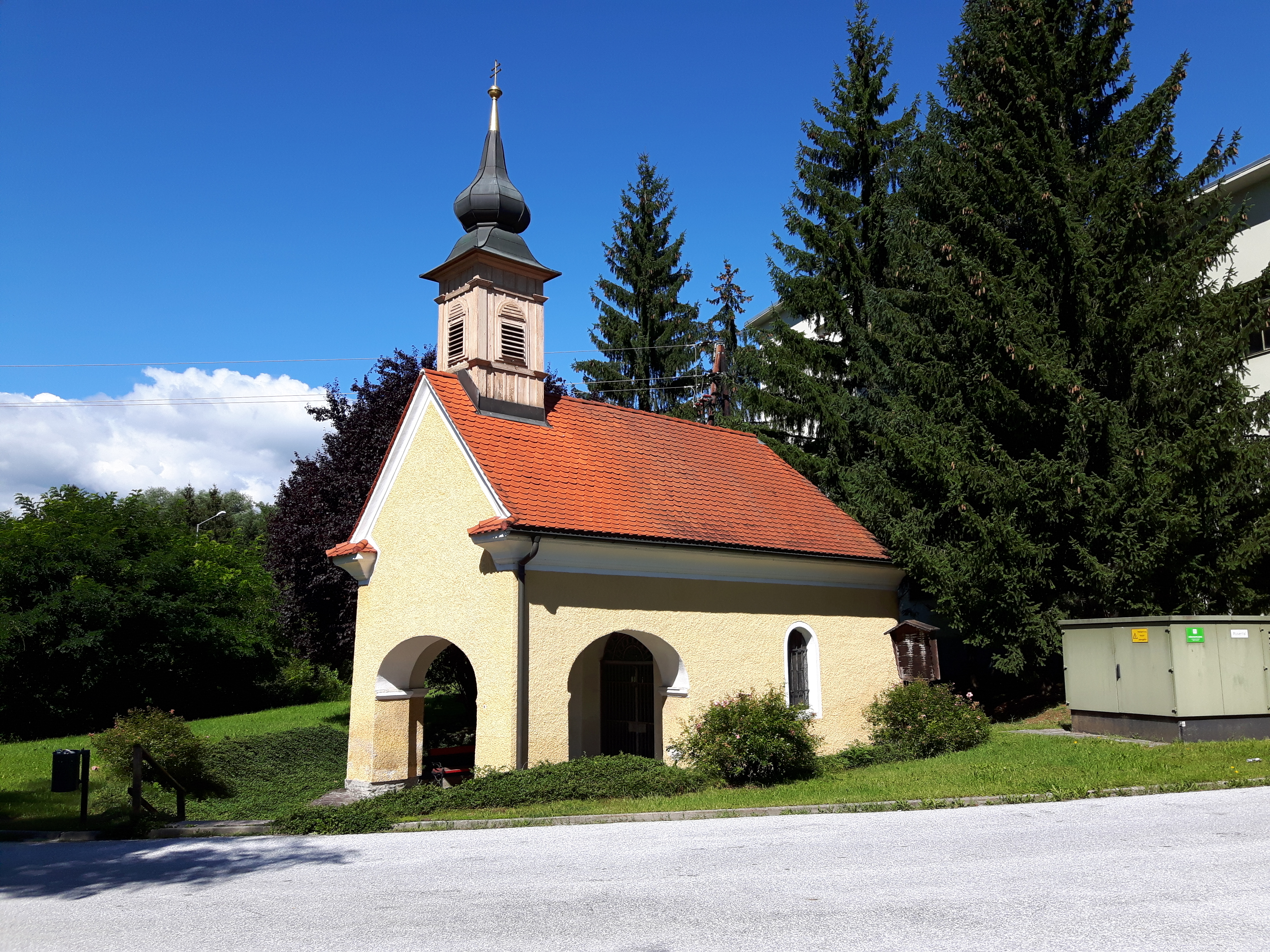 Ortskapelle